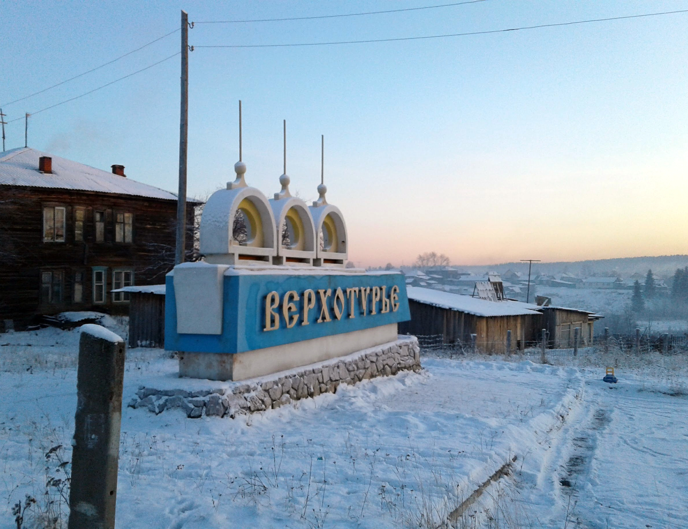 Верхотурье зимой